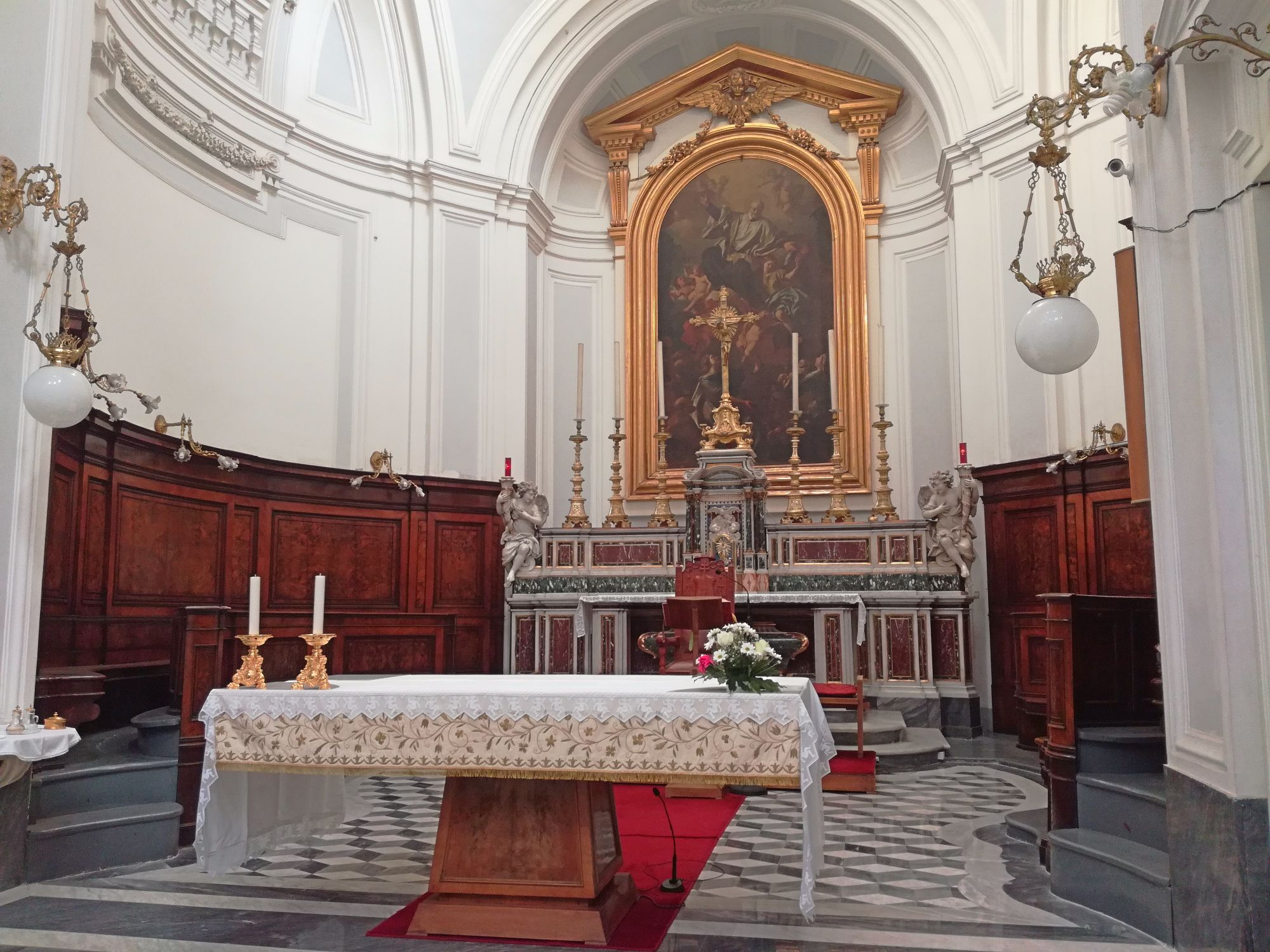 Missione ai Vergine